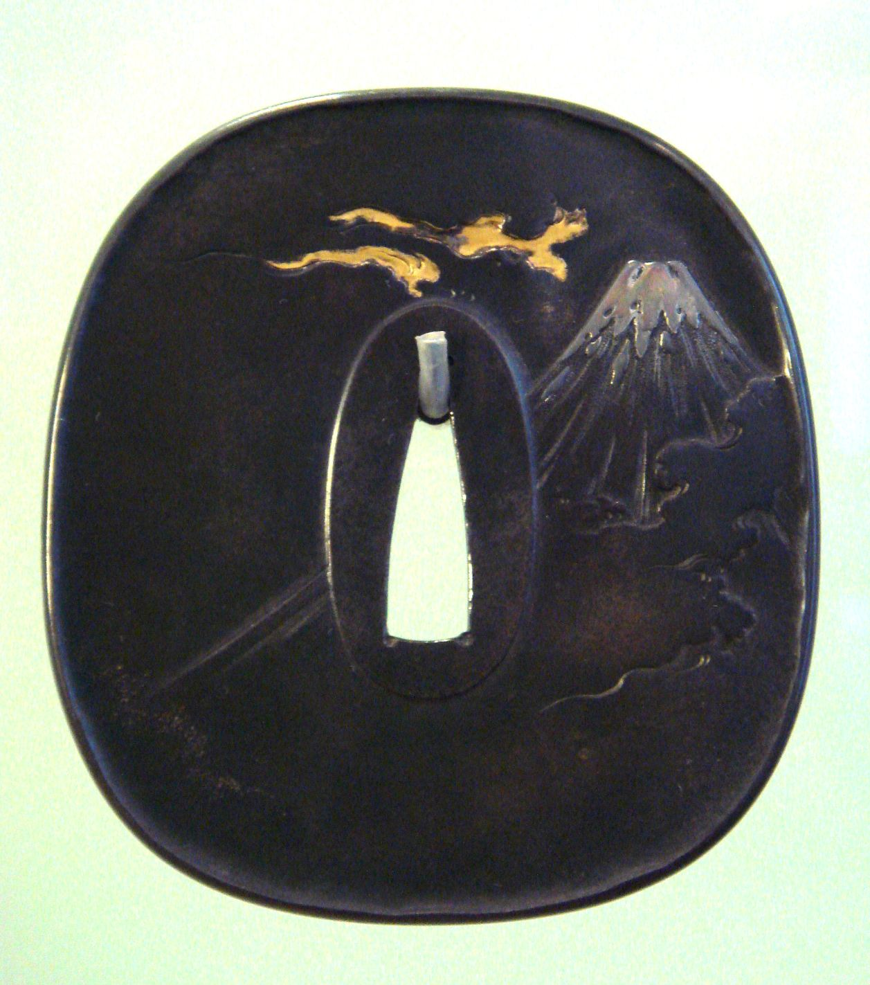 Katana Sword Guard Fuji